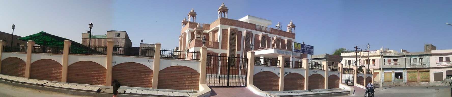 आयकर कार्यालय पूर्ण चित्र